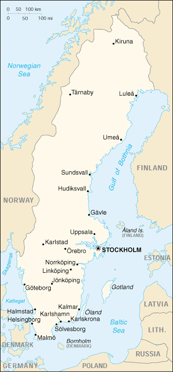 Map of Sweden.